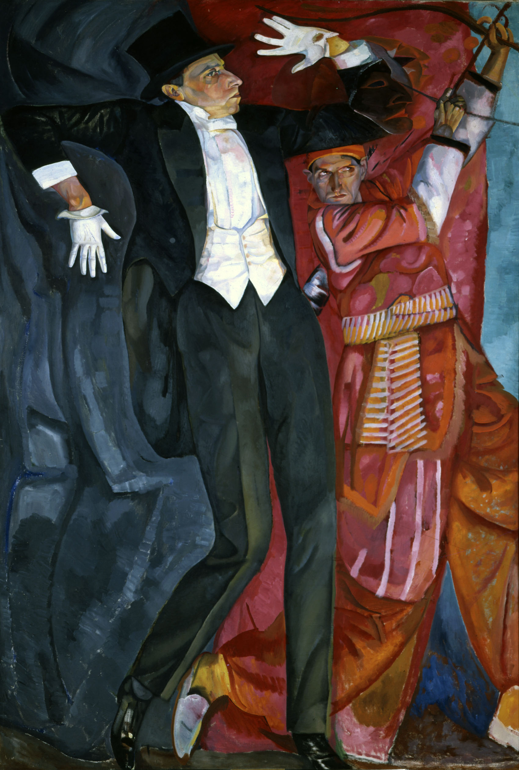 Портрет режиссера В. Э. Мейерхольда. 1916. Масло Меерхольд изображен в роли Лучника и в роли Денди. "На одном из самых своих грандиозных, фантастических парадных портретов, уже упоминаемом «двойном» портрете Мейерхольда, Григорьев с фотографической точностью зафиксировал две репетиции режиссера в его питерской студии на Бородинской улице. Борис Григорьев был одним из учредителей этой студии и присутствовал почти на всех репетициях. Мейерхольд обучал студийцев прежде всего правильно, выразительно двигаться. На заднем плане картины Мейерхольд в алом плаще лучника натягивает тетиву – мол, вот так надо на сцене убивать. А на переднем плане Мейерхольд в черно-белом костюме денди обучает тому, как надо на сцене умирать. У его артистки Каролины Павловой, занятой в пьесе Шницлера «Шарф Коломбины», не получалось сыграть смерть. В конце концов Мейерхольд взбежал на сцену сам и показал, как это делается. Отсюда – косящий вбок глаз Мейерхольда на портрете: дескать, понимаете, как это надо изобразить? Следите за мной?" Portrait of Meyerhold